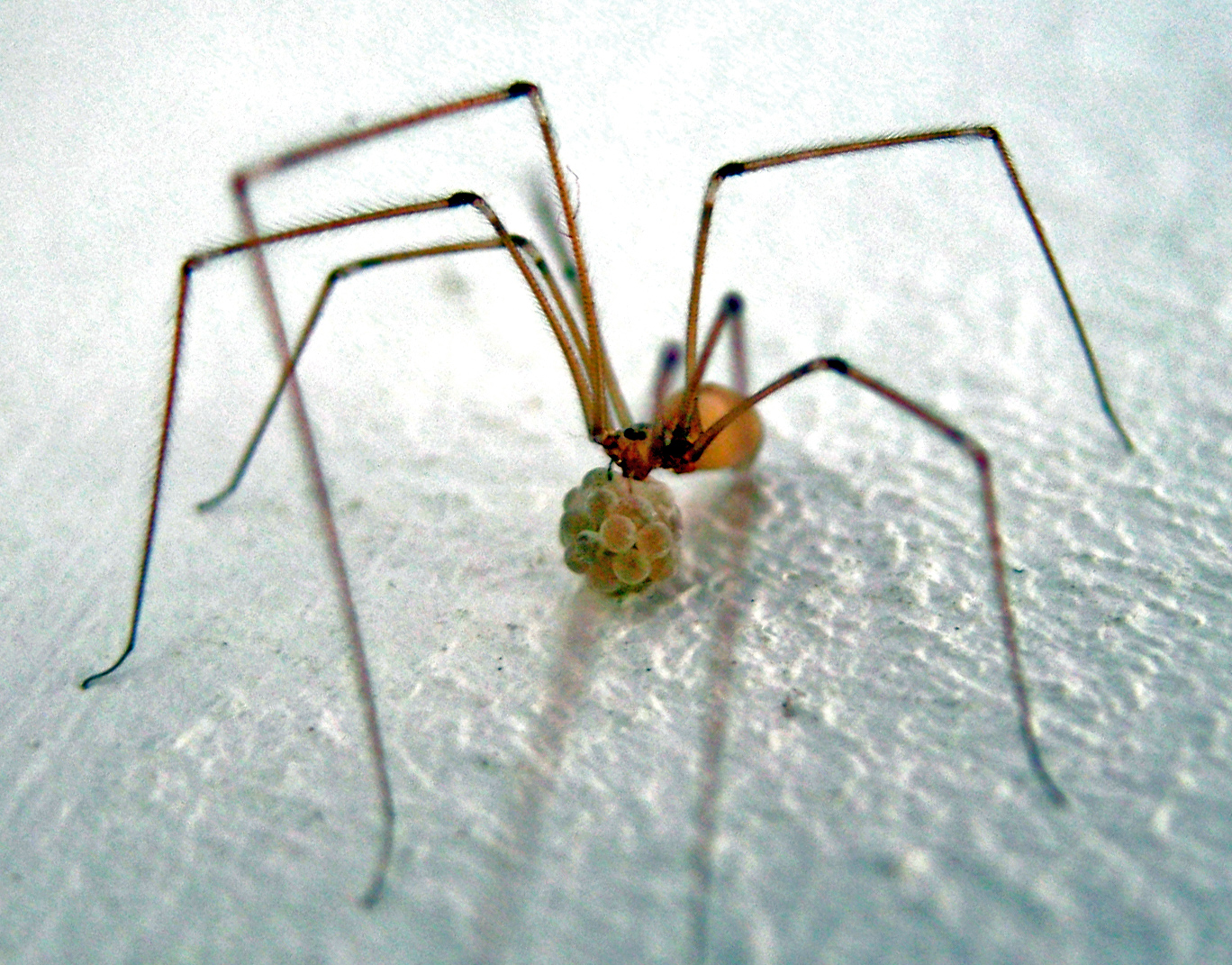 Spinne mit Brut